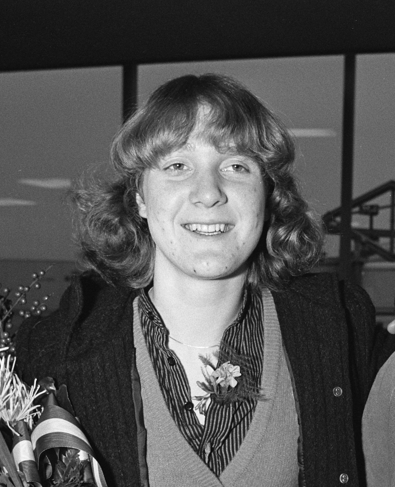 Op Schiphol judodamesploeg Anita Staps